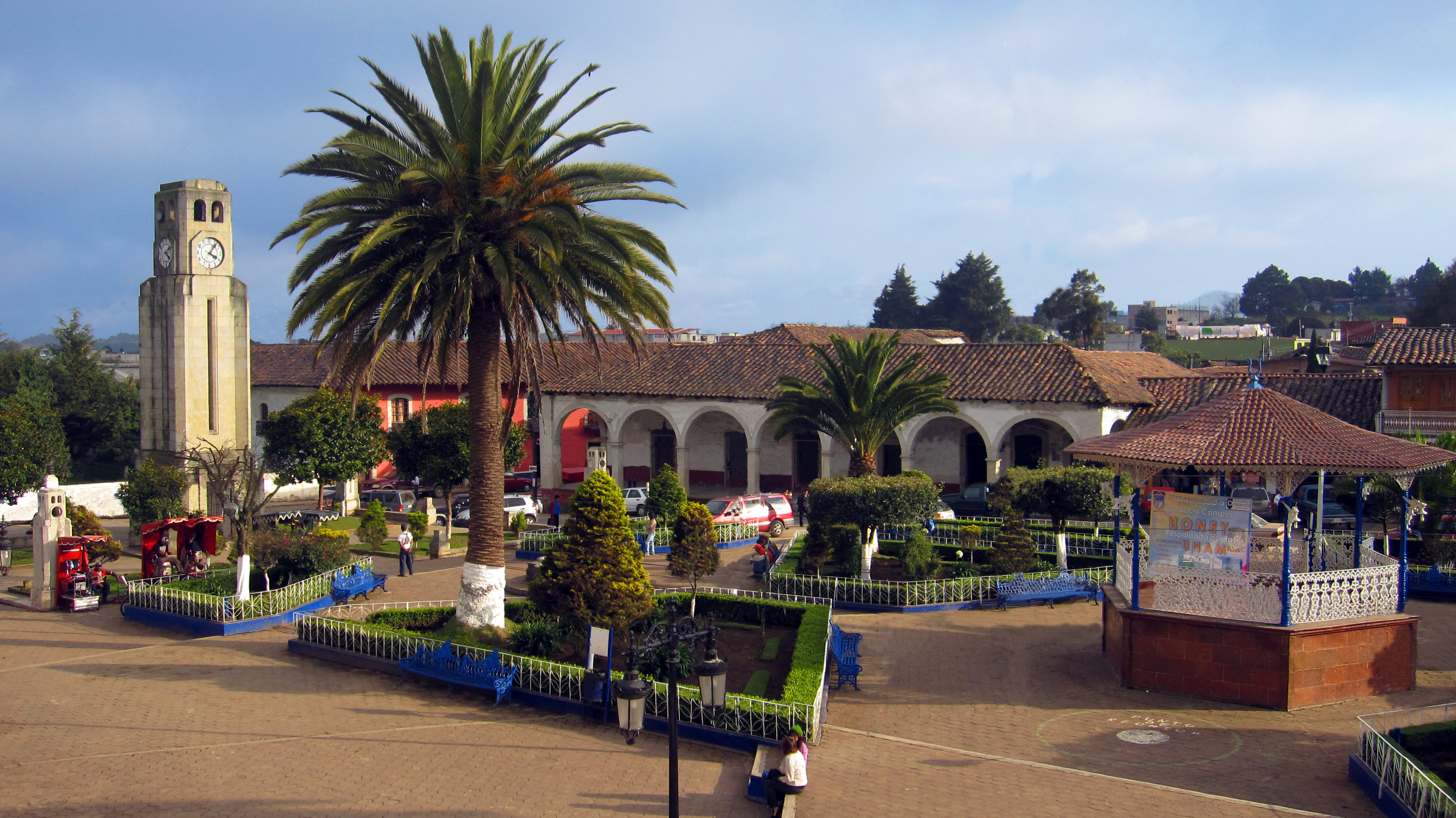 Vista desde la presidencia municipal de Acaxochitlán.